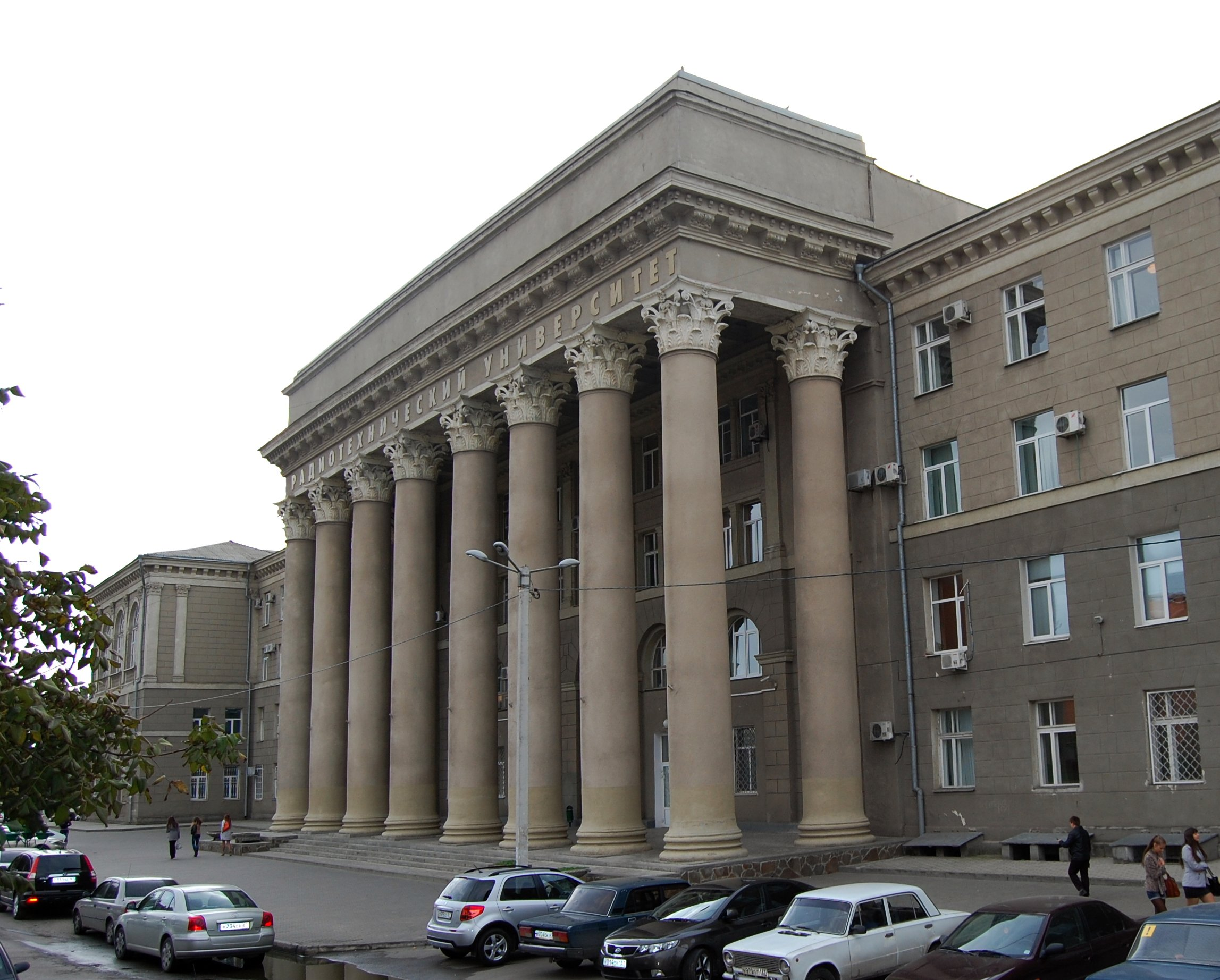 Таганрогский Радиотехнический институт, Корпус "Г"